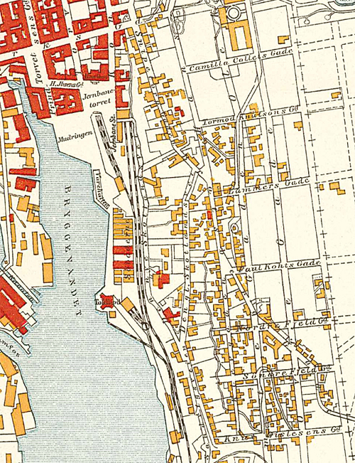 Kart over Bratsbergkleiva, Skien.